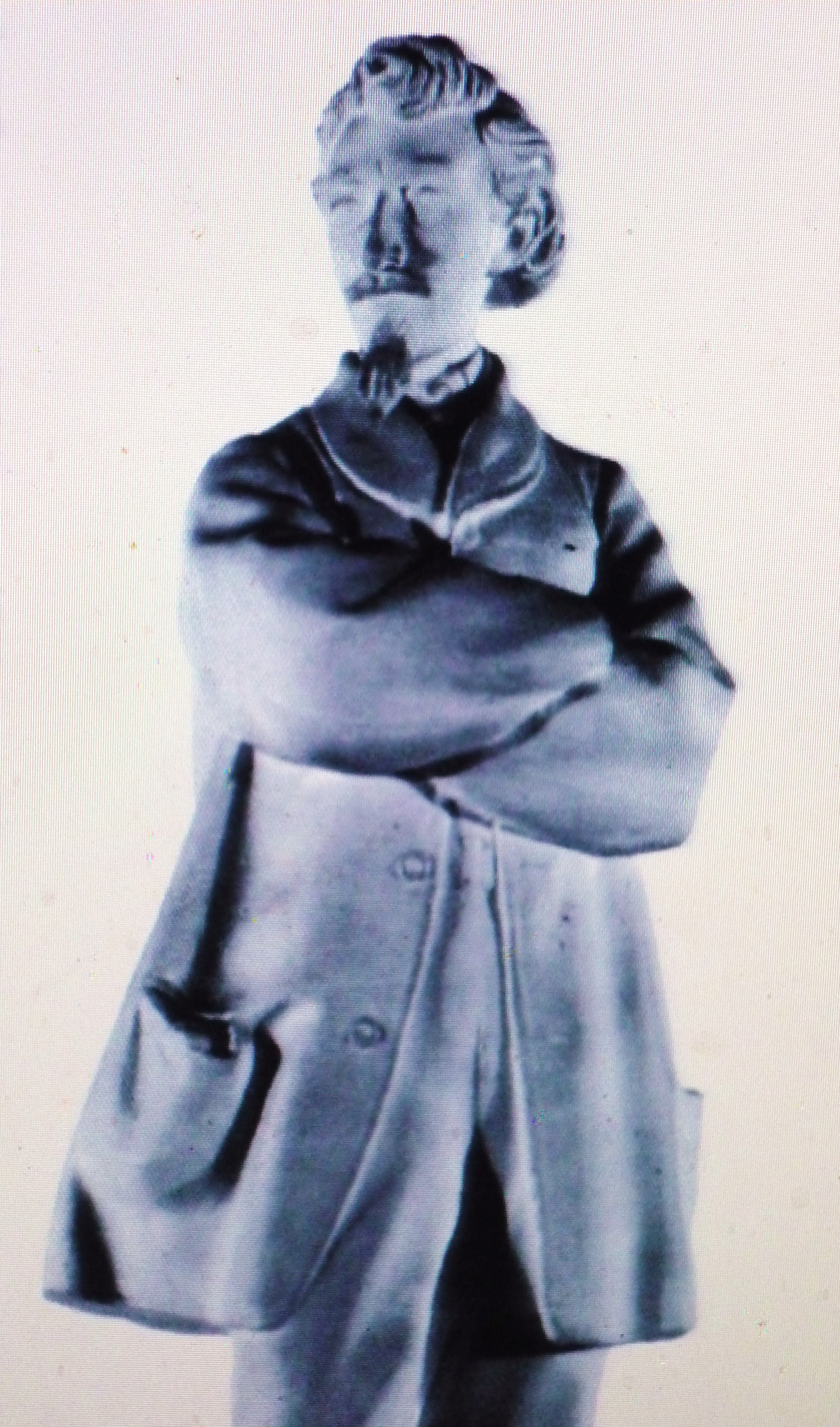 Portrait en photosculpture de François Willème réalisé dans les années 1860.